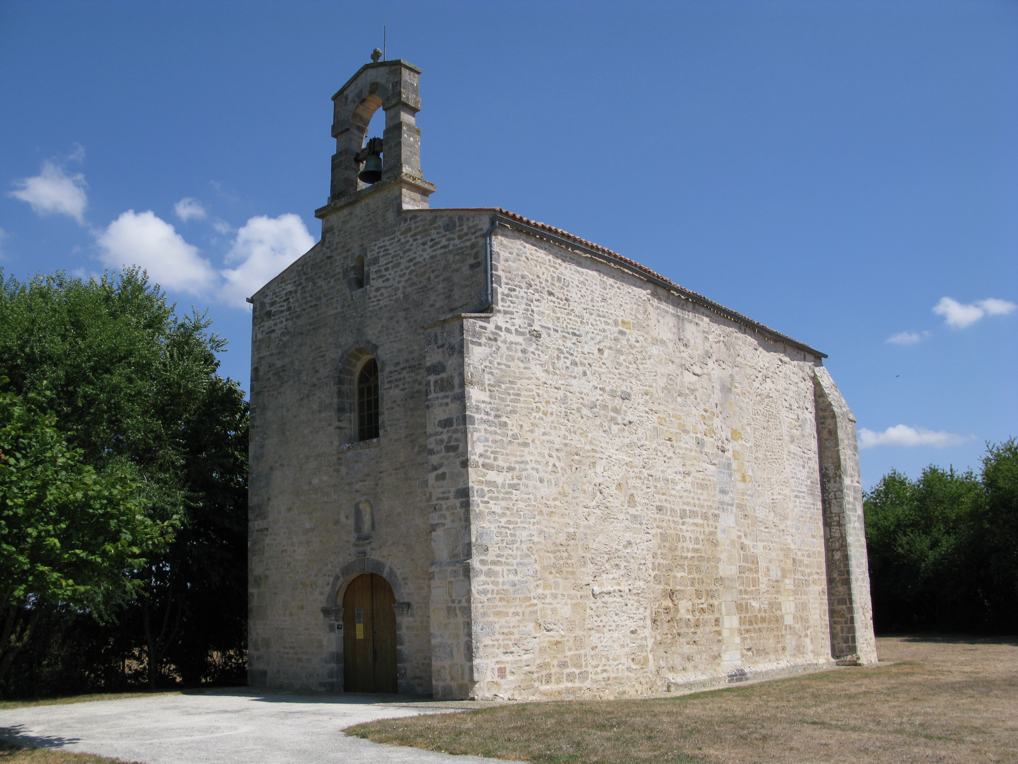 L'église de Breuil-la-Réorte